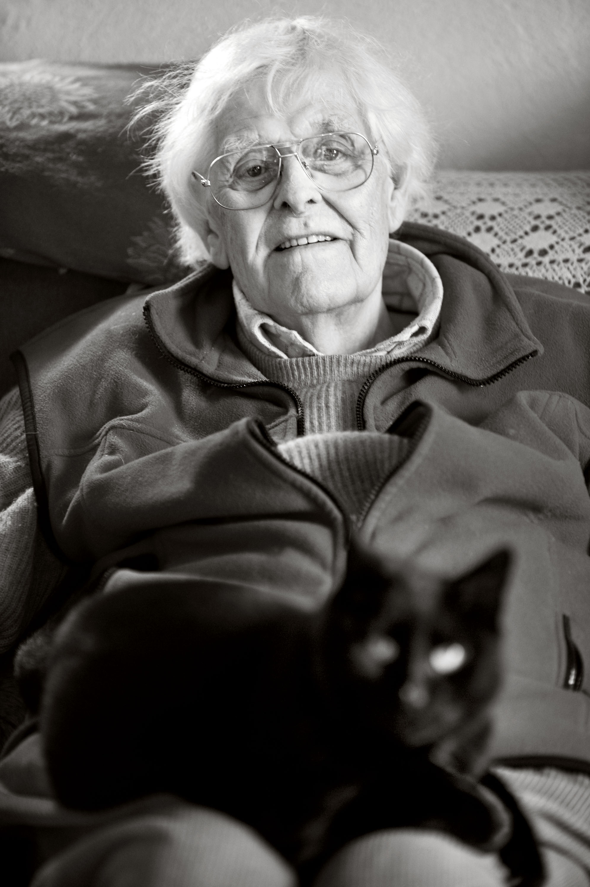 Schrijver Ivo Michiels met kat 'Tovenaar' op schoot in zijn huis in Le Barroux.